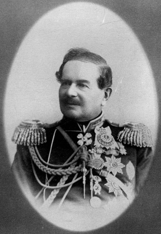 Долгоруков, Владимир Андреевич